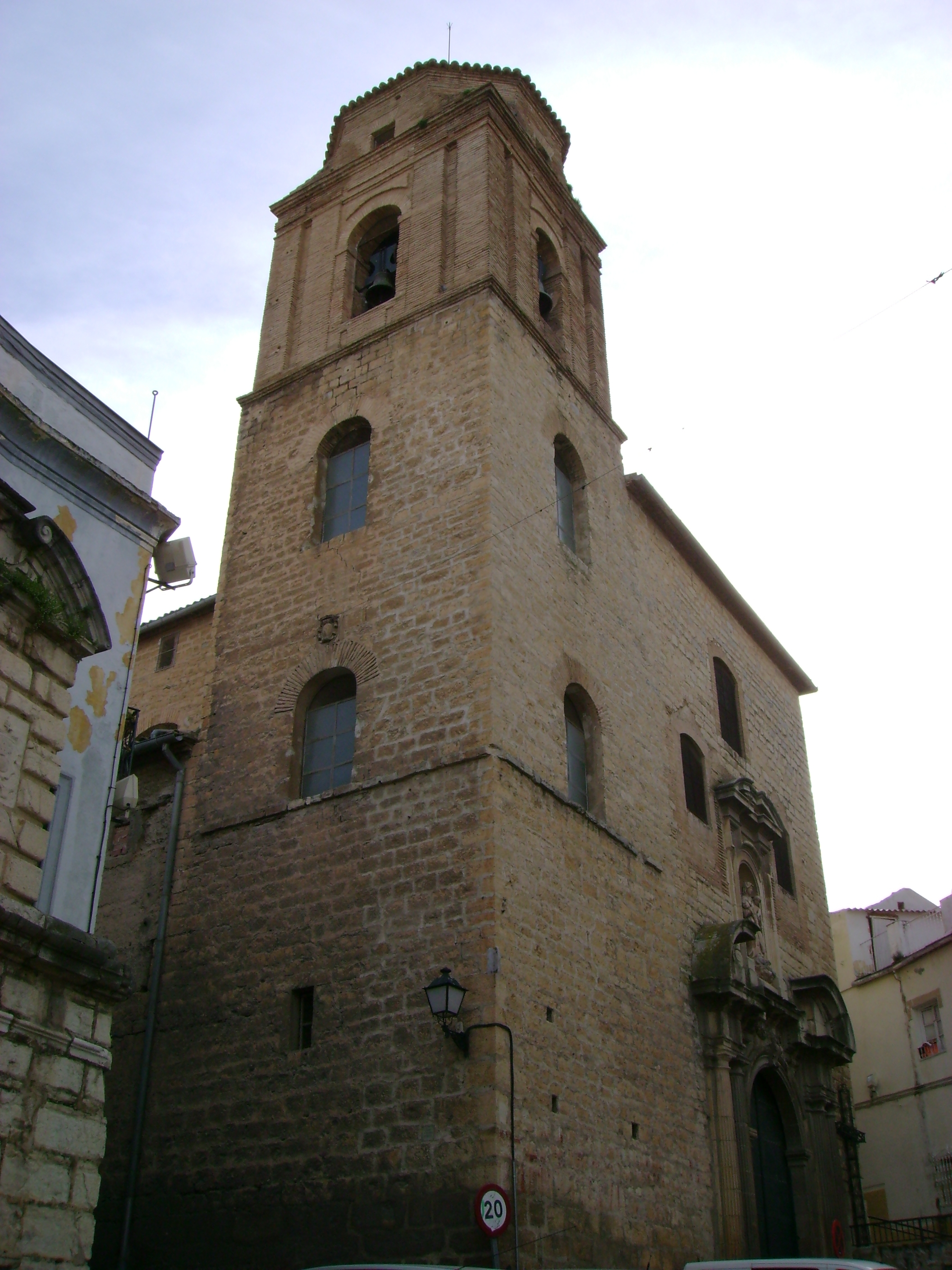 Torre de la Iglesia de la Merced de Jaén.